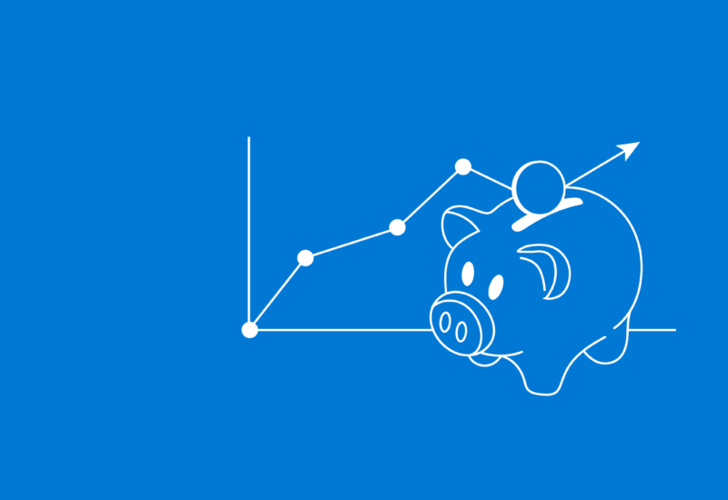 Կիրառական տնտեսագիտություն